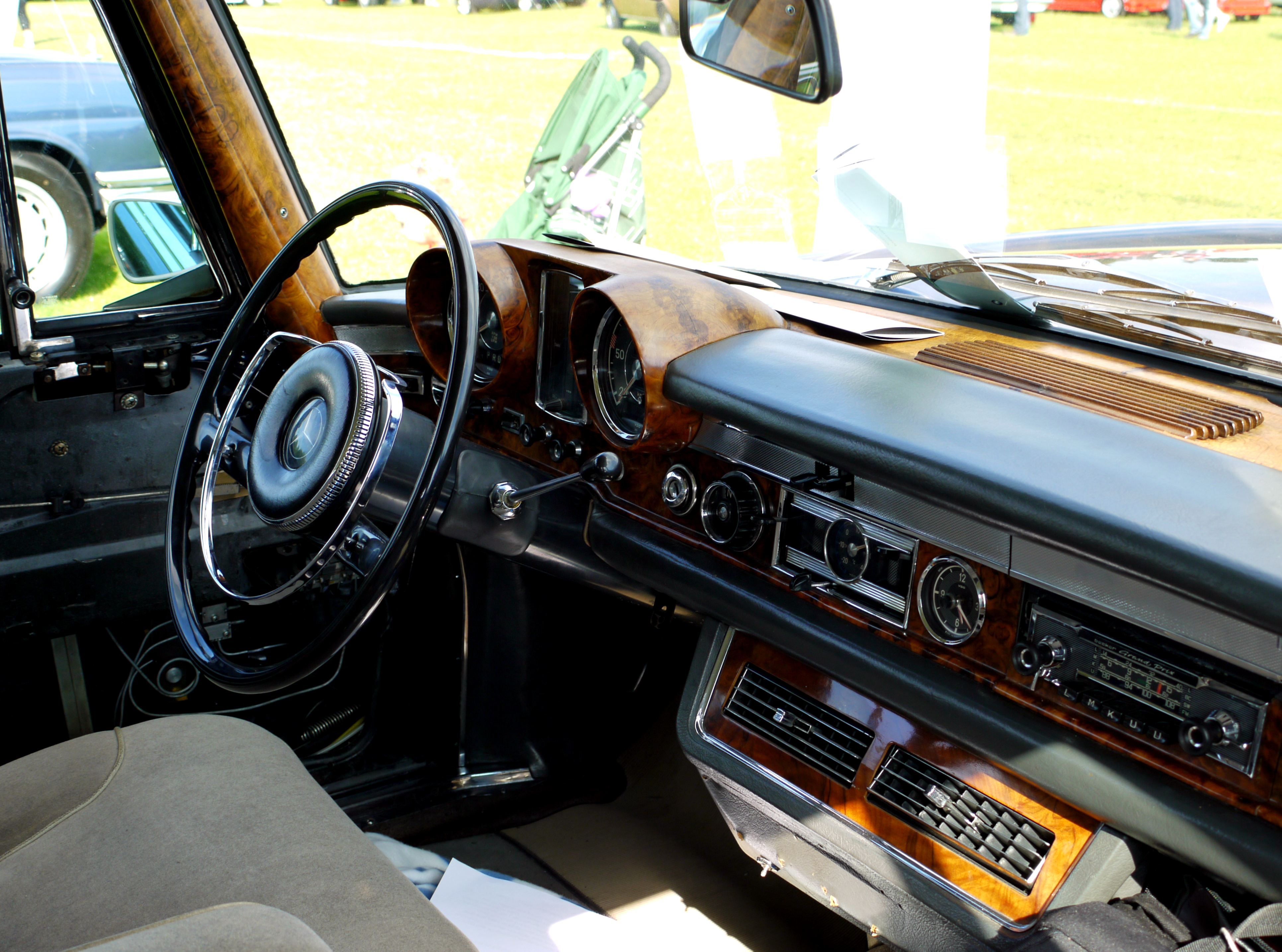 1965 Mercedes Benz 600 SWB interior.